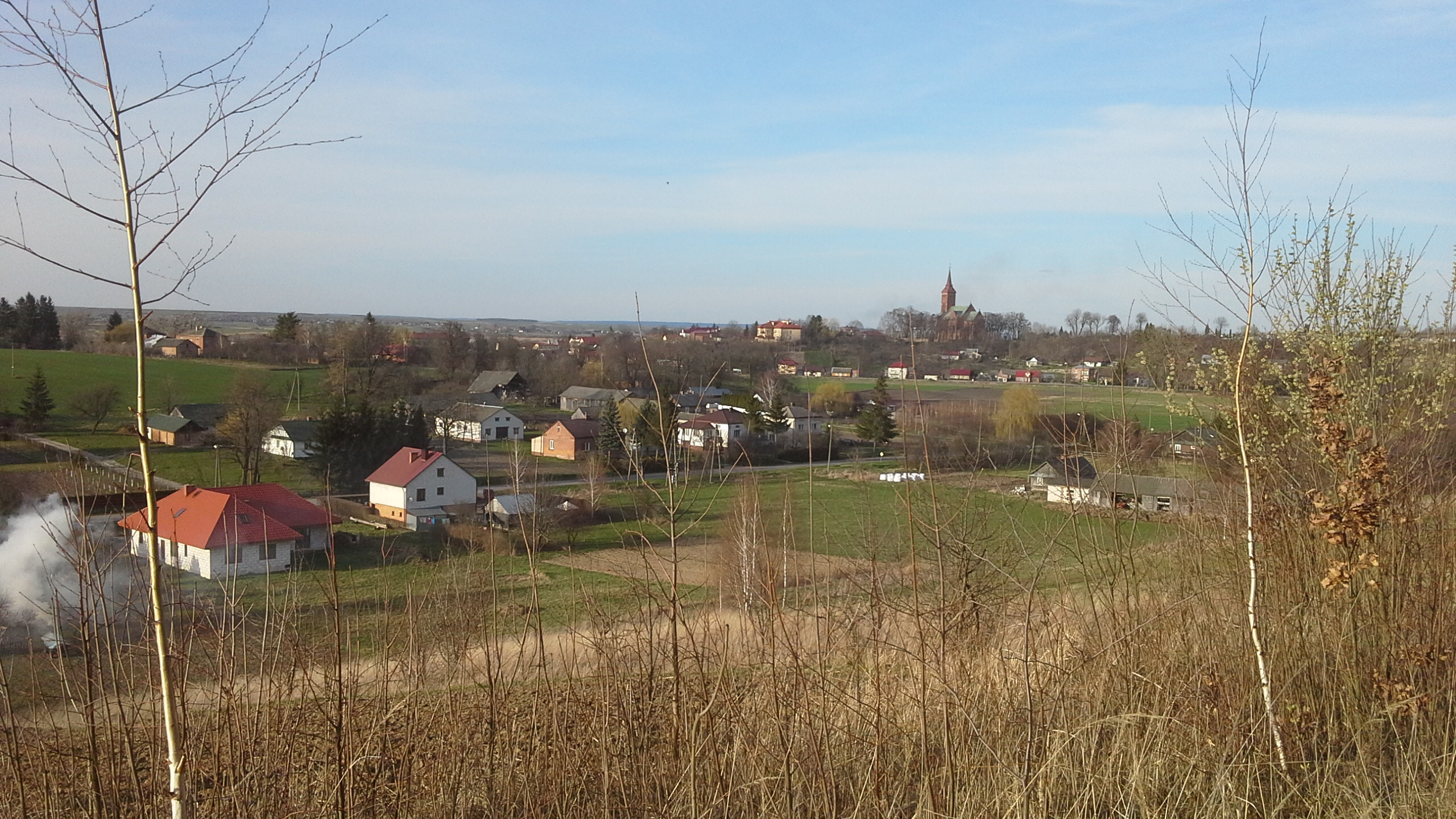 Widok na Komarów-Wieś z cmentarza prawosławnego